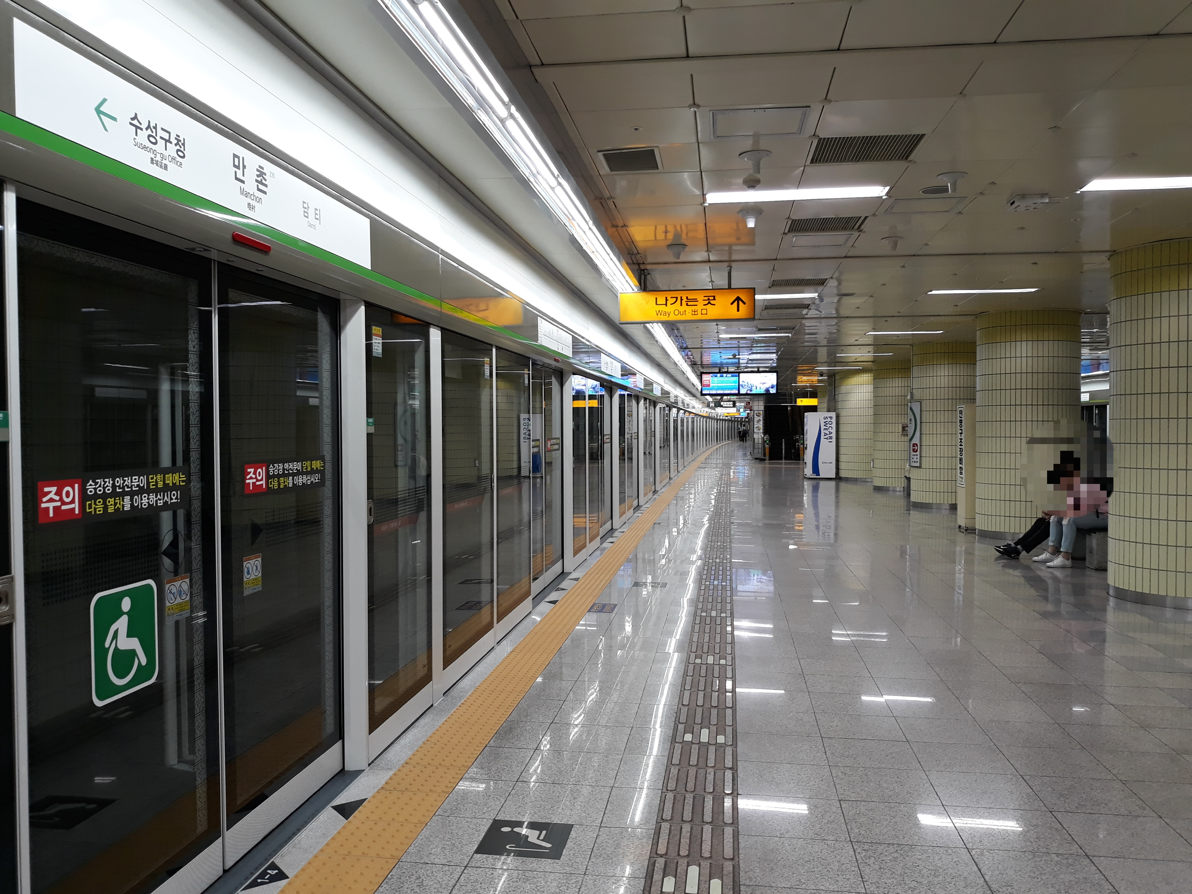 대구 도시철도 2호선 만촌역 문양 방면 승강장